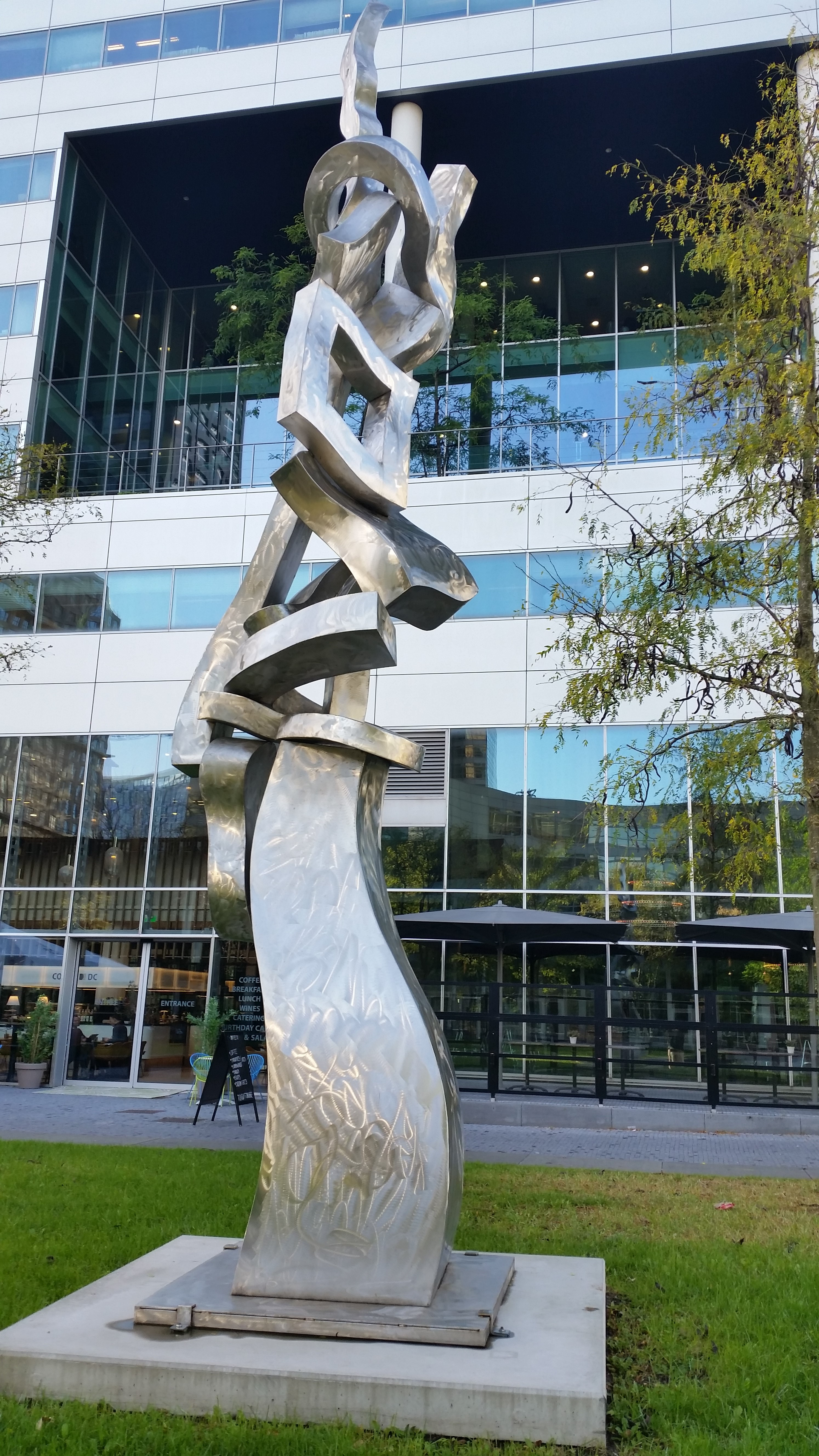 Menhir Tower uit 2008 van kunstenaar Hans Van de Bovenkamp op het Gustav Mahlerplein in Amsterdam-Zuid (ArtZuid)